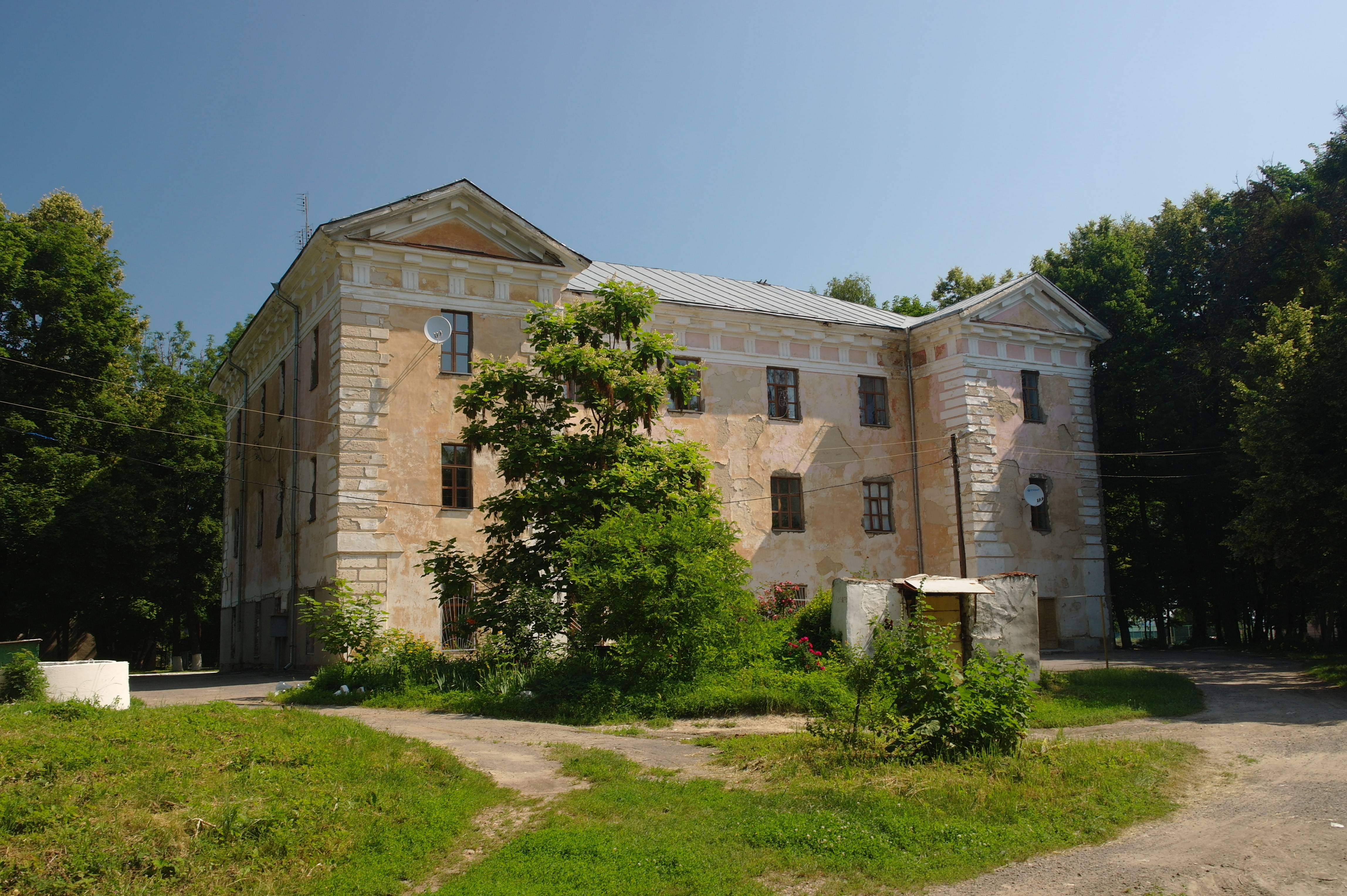 Вінниця, садиба в П'ятничанах, палац